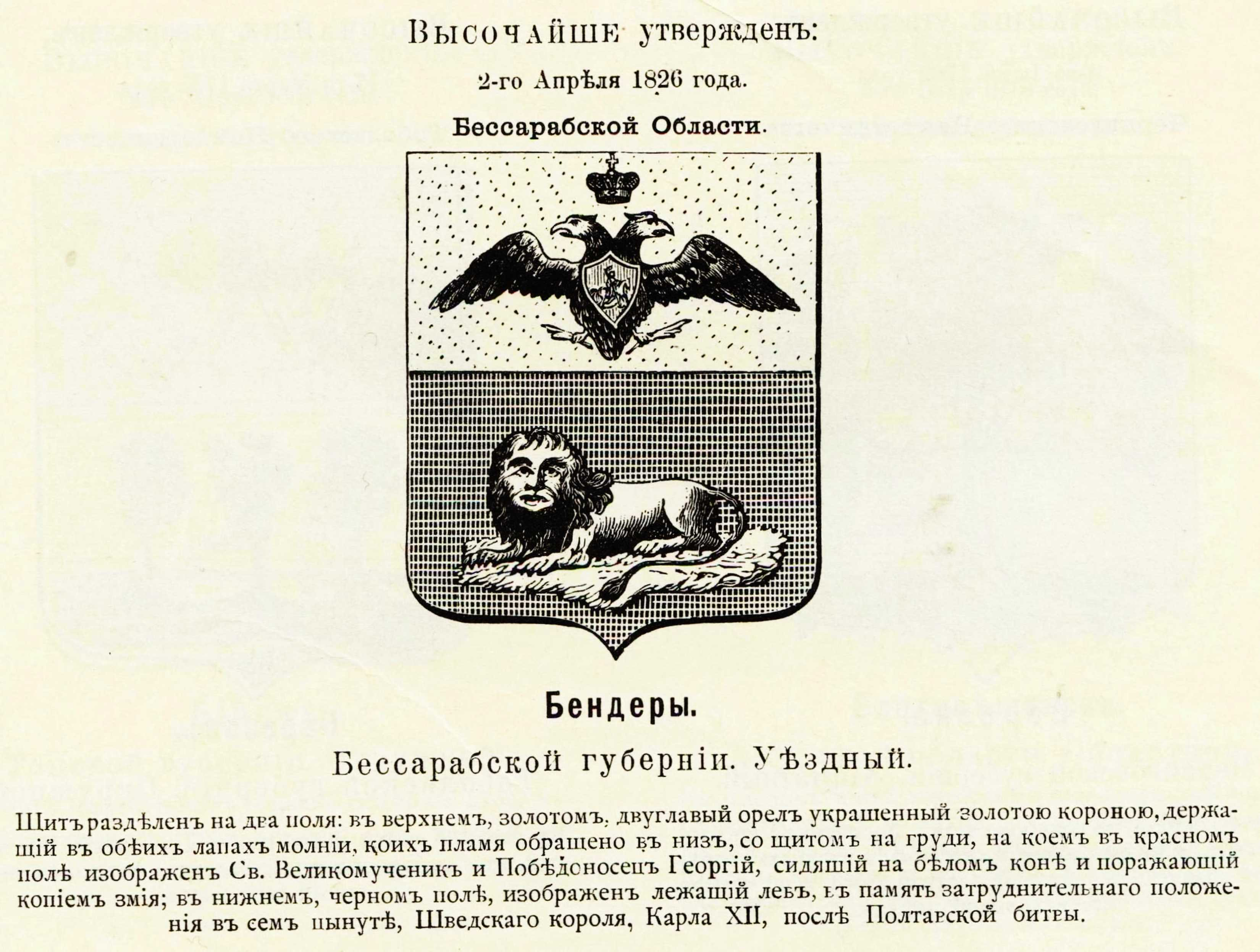 Official Russian Empire coat of arms Bendery. Герб Российской Империи уездного города Бендеры Бессарабской губернии с официальным описанием в Гербовнике Винклера.